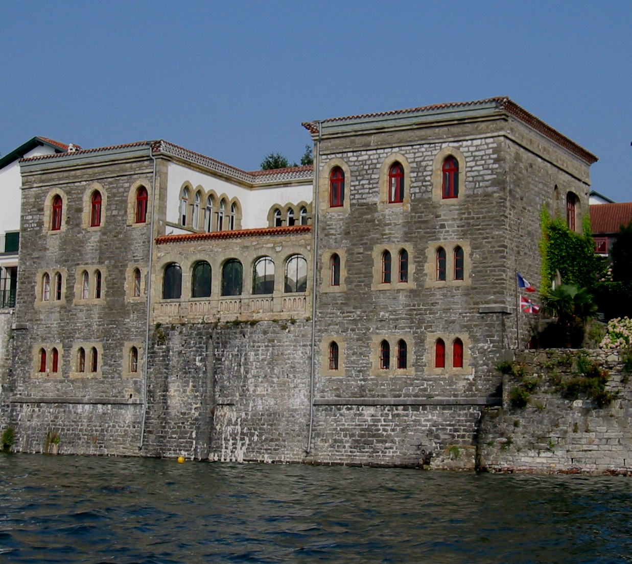 La Villa Mauresque sur la Bidassoa